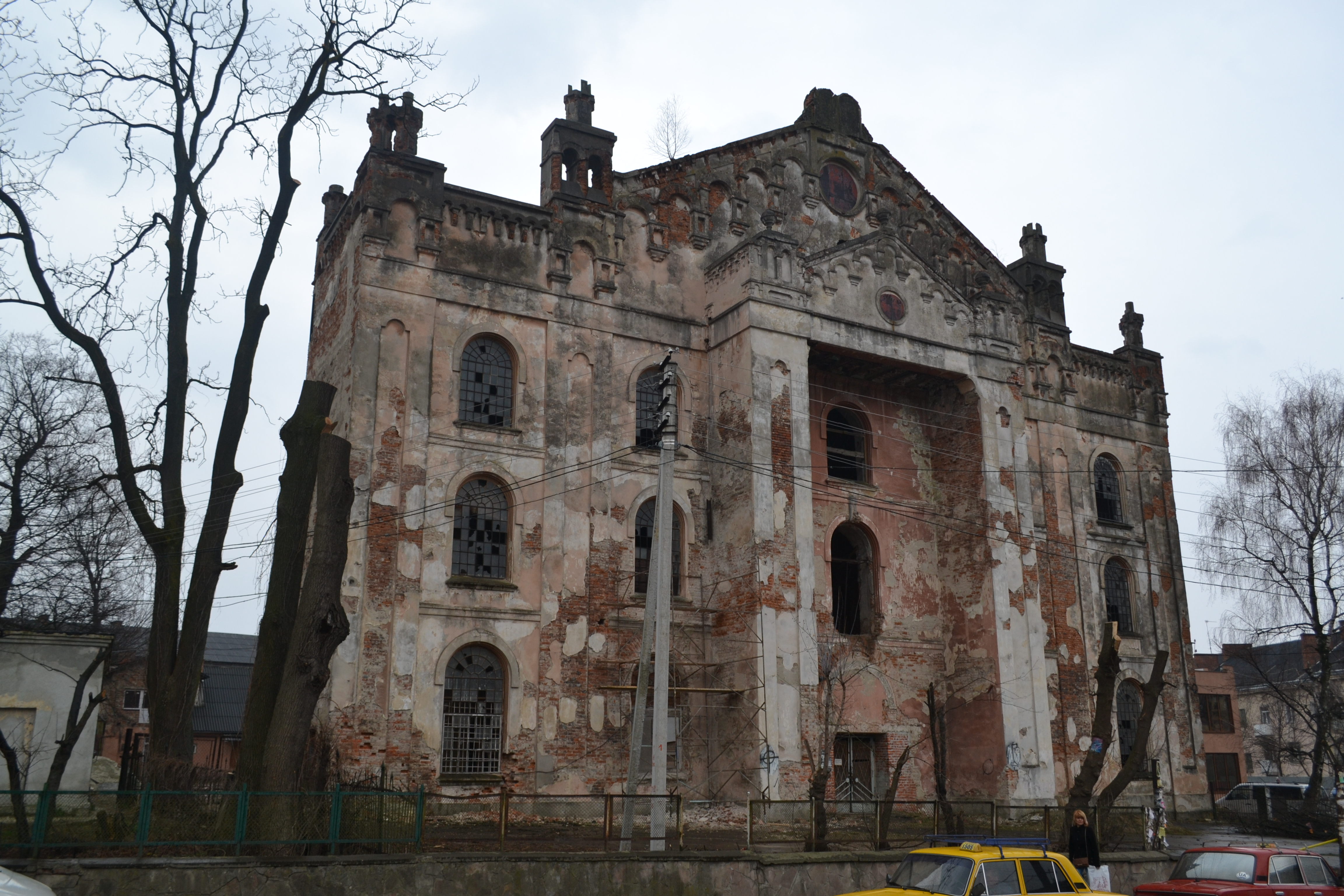 Хоральна синагога (Дрогобич), Дрогобич, вул. П. Орлика, 6